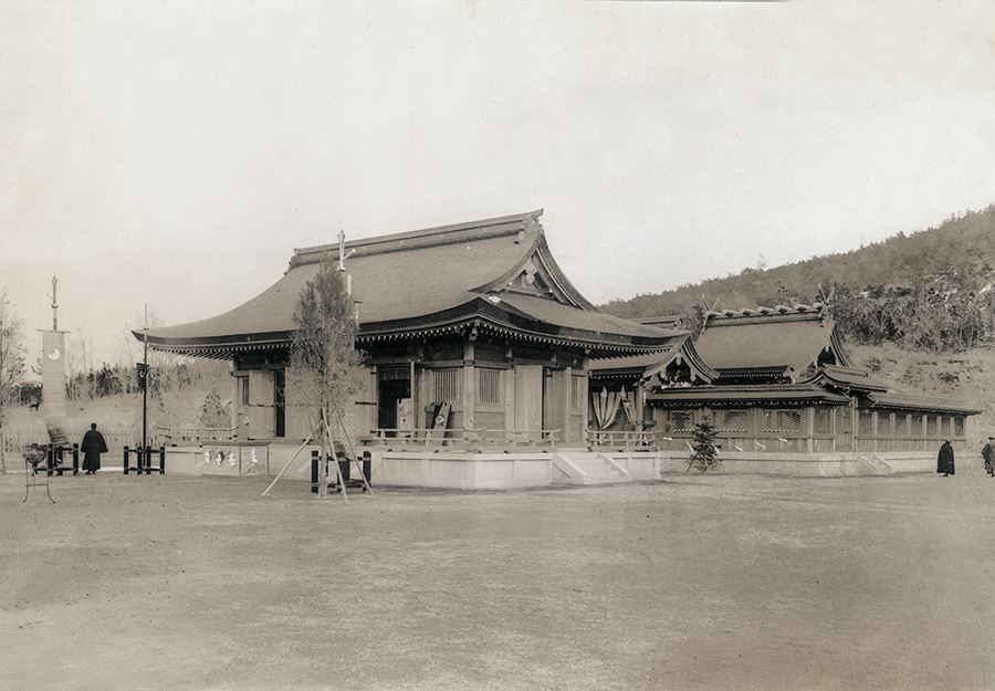 青岛神社拜殿及本殿